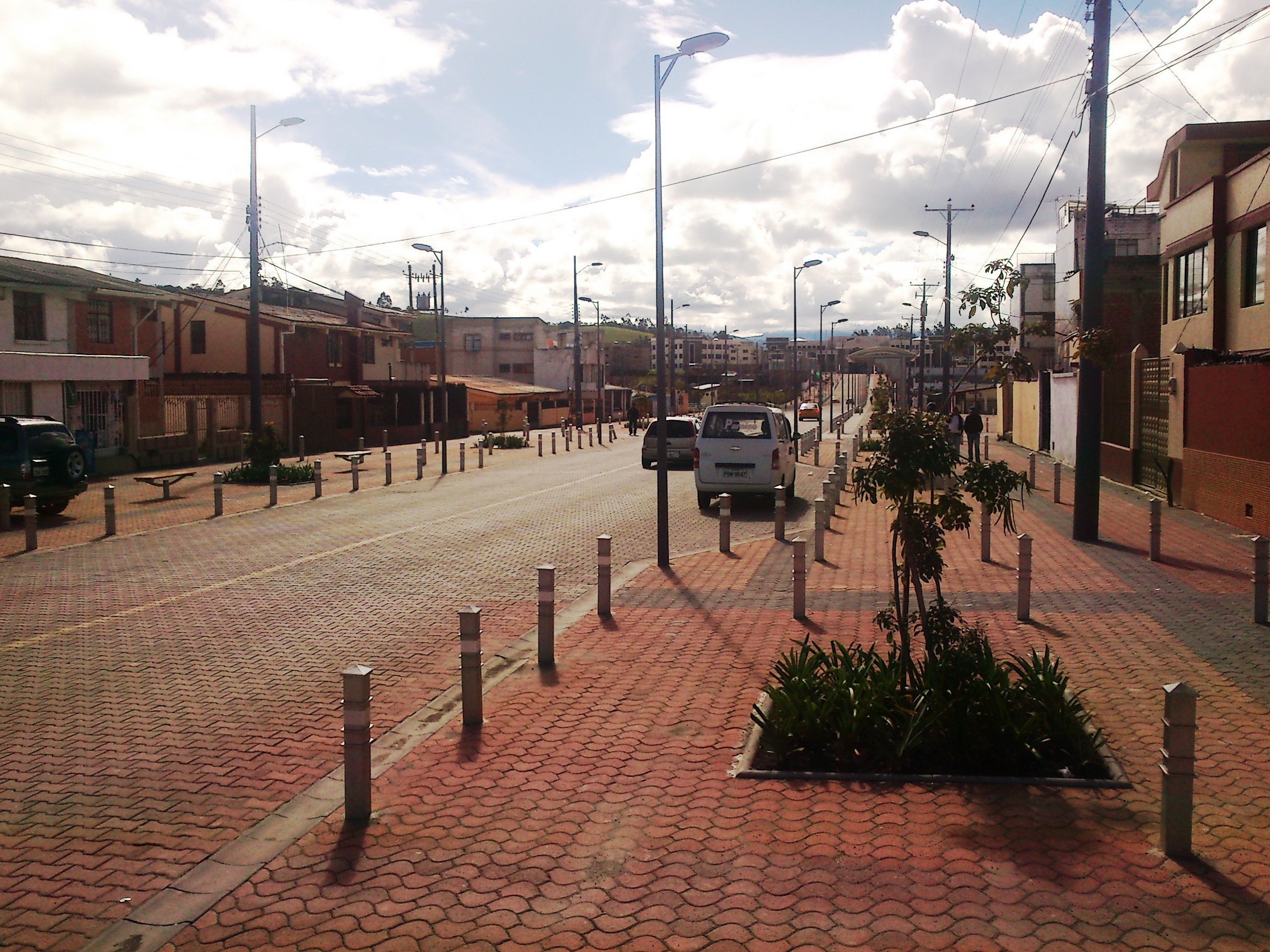 Tulcán - Avenida Universitaria